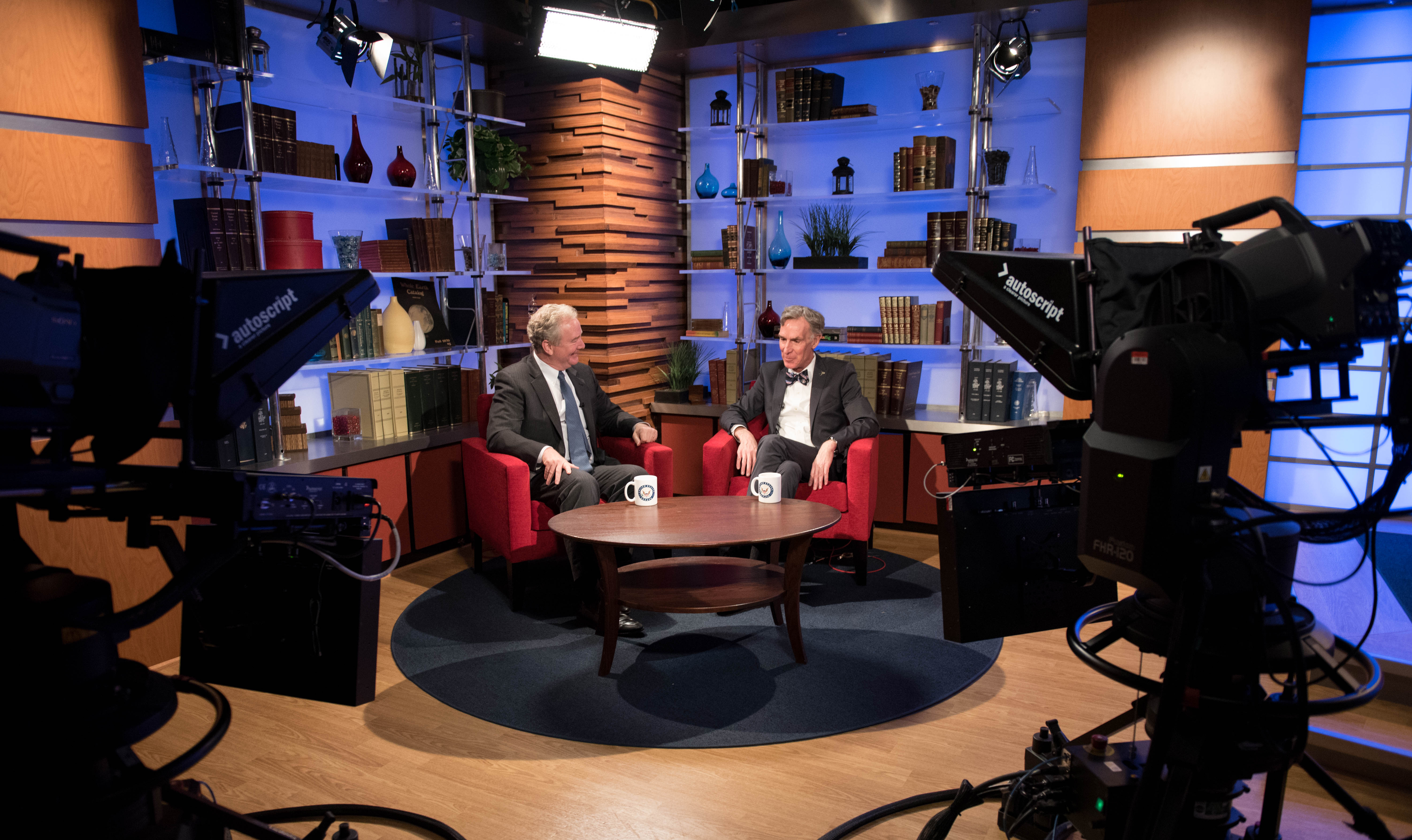 VanHollen_BillNye6